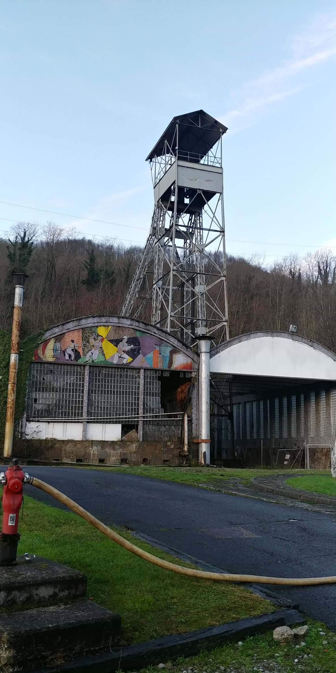 Pozo minero Fondón, en Sama, Asturias (España)